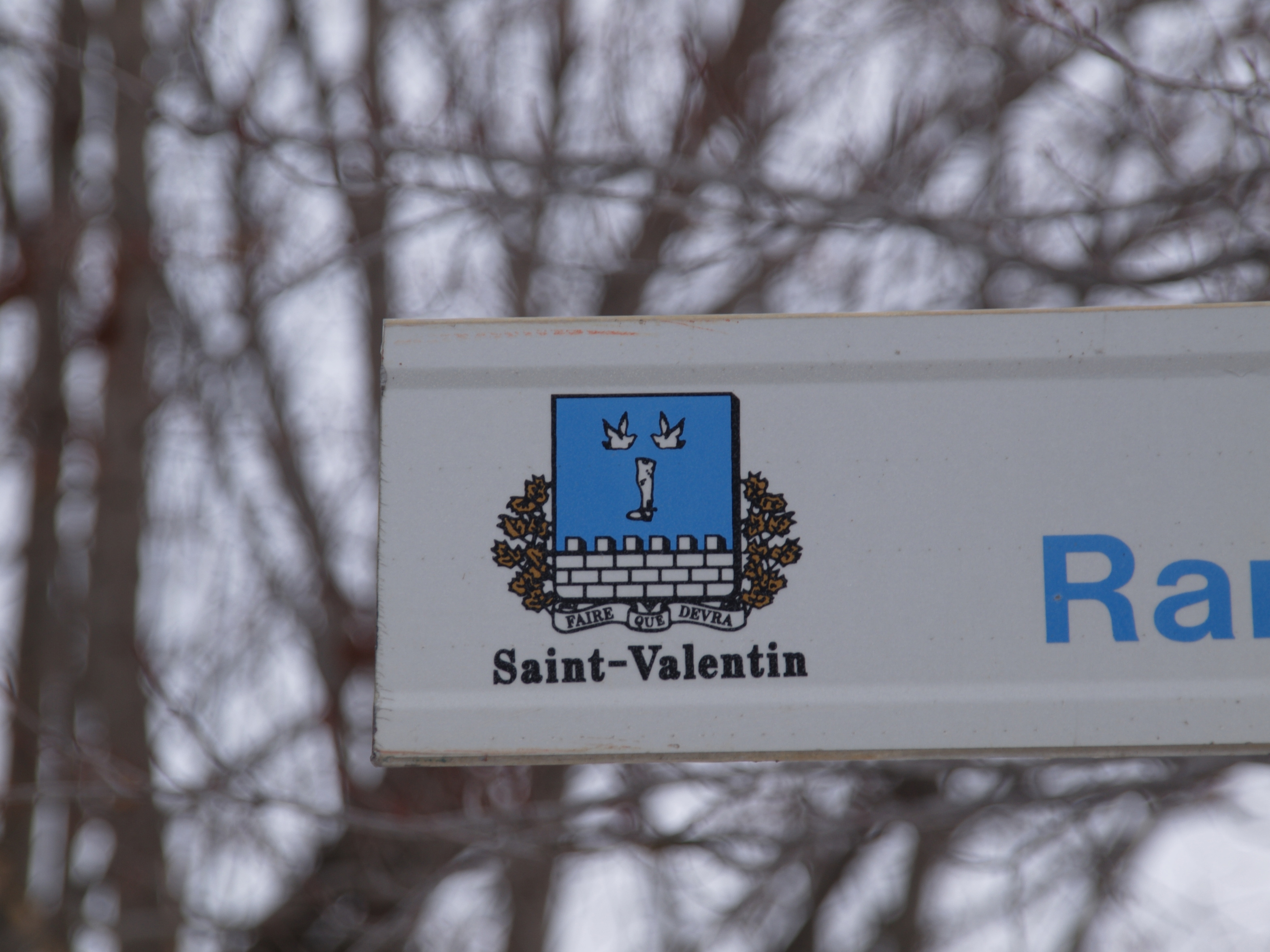 Saint-Valentin - Blason figurant sur les panneaux signalétiques